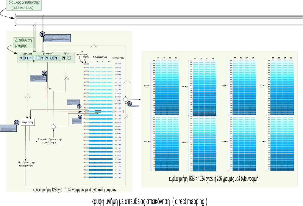 Σχεδιάγραμμα αρχιτεκτονικής κρυφής μνήμης πλήρους απεικόνισης